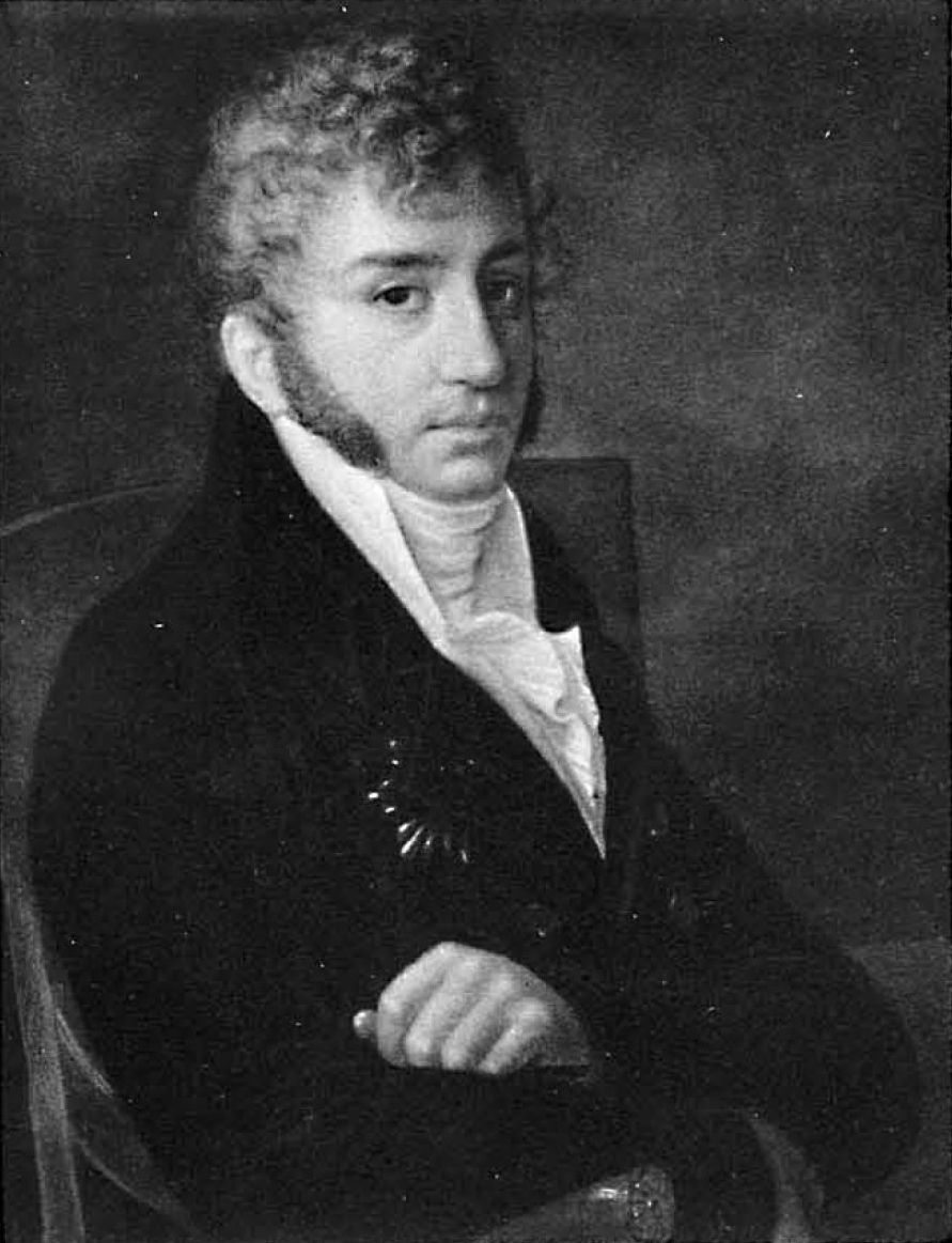 Светлейший князь Сергей Николаевич Салтыков (1776-1828)